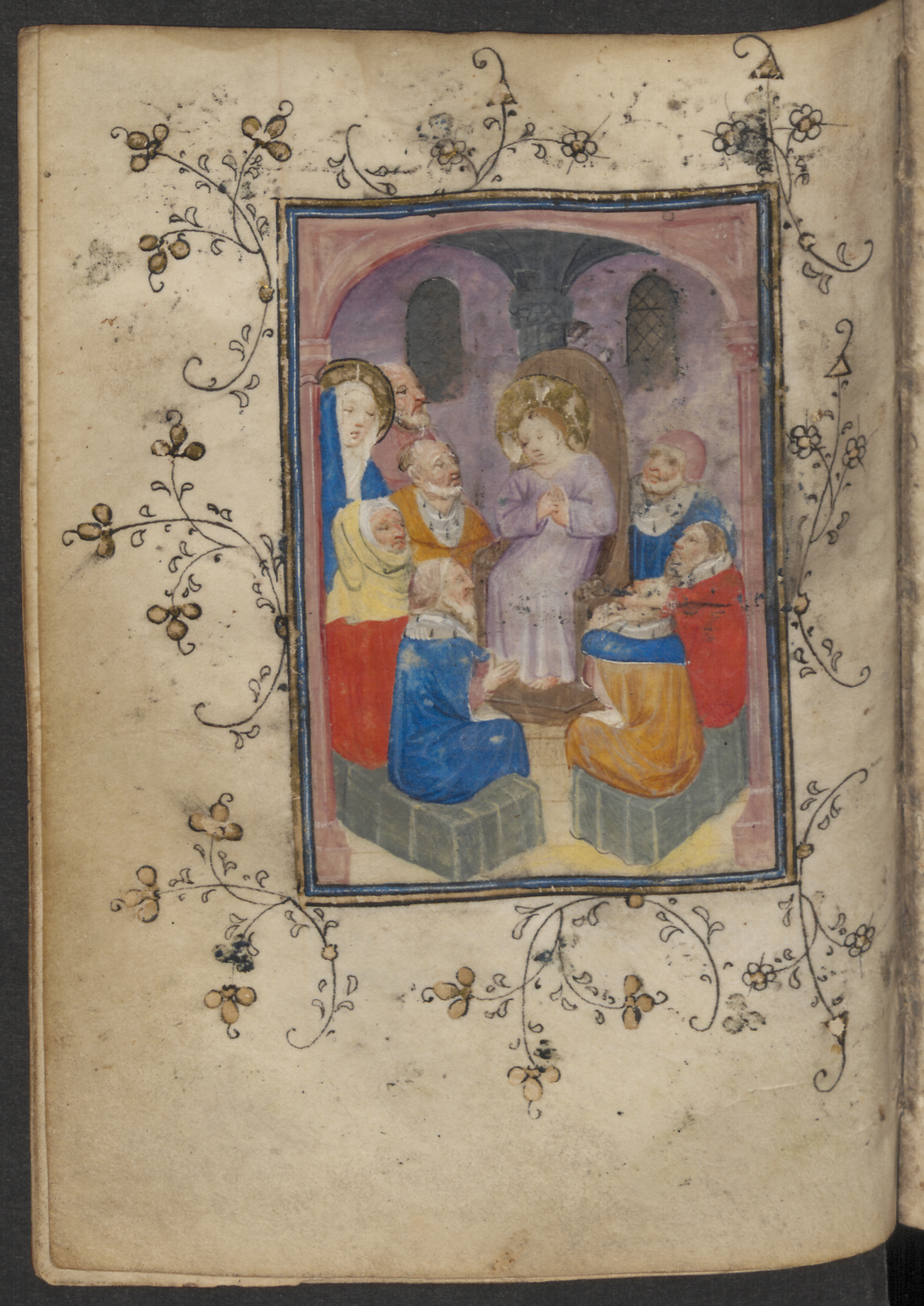 Hs. 16 B 8, f. 91 v. Crucifixion